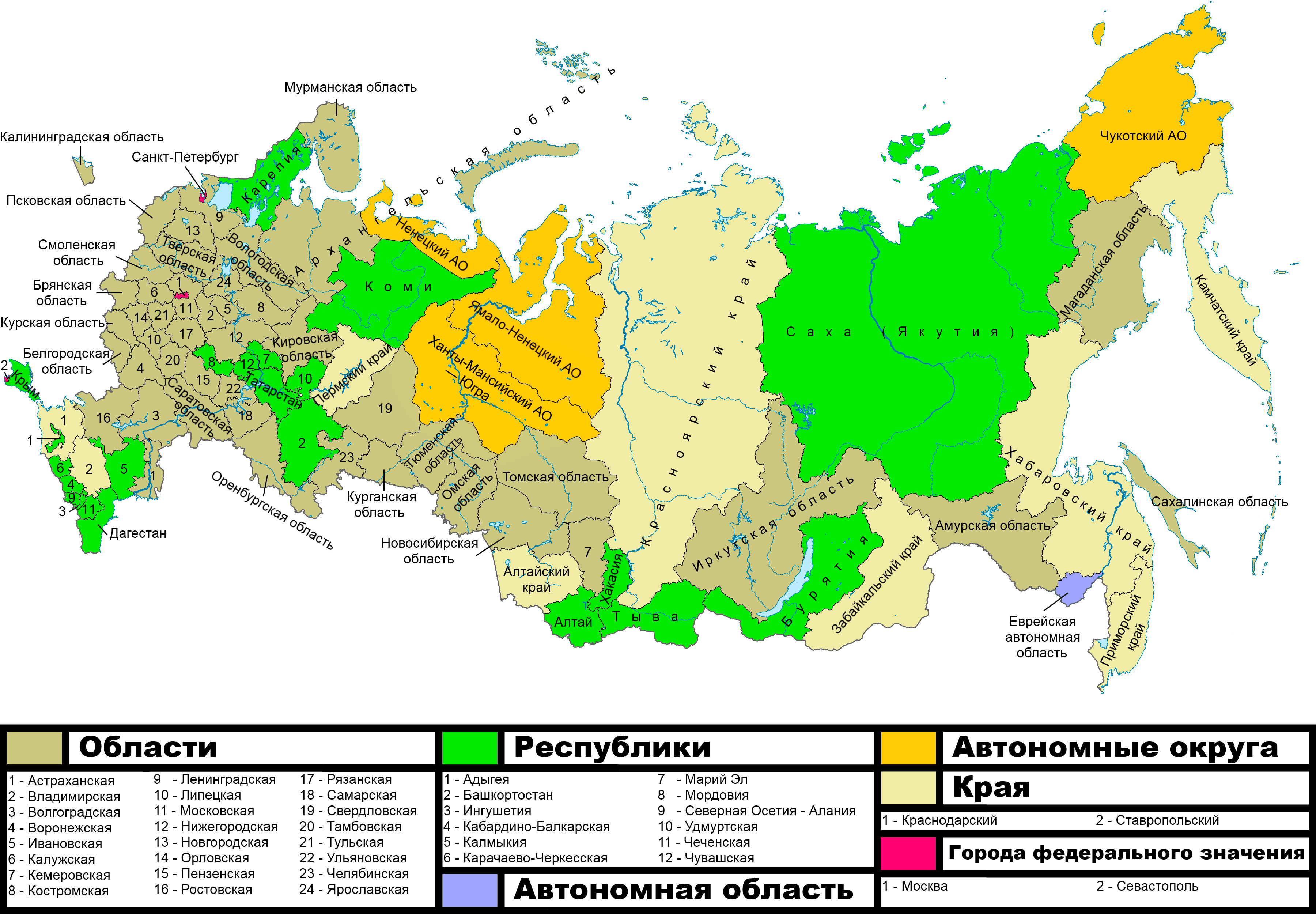 Федеративное устройство России по состоянию на 21 марта 2014 года (с учётом Республики Крым и города федерального значения Севастополя, рассматриваемых бо́льшей частью международного сообщества как территории Украины)